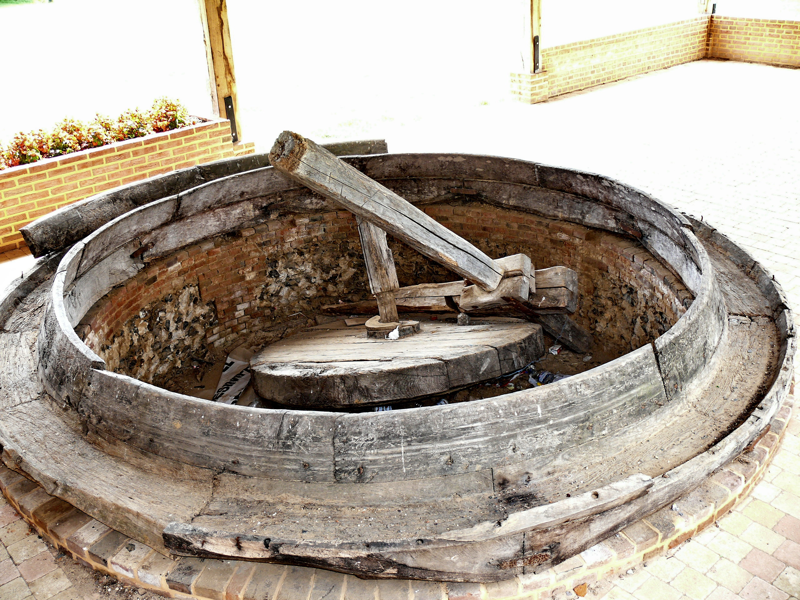 Beaudéduit : restes d'un ancien broyeur à pommes à cidre, en cours de réinstallation à coté de l'église.